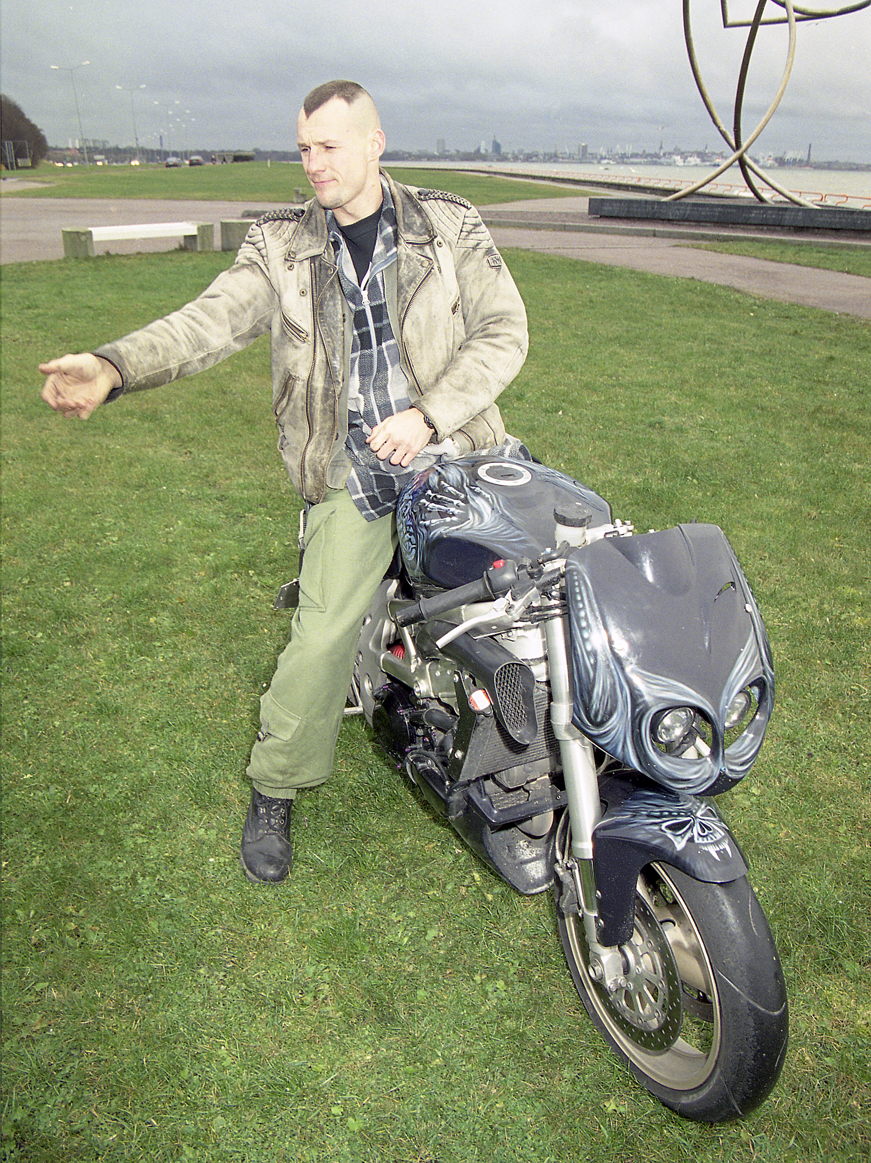 Jaanus Karm